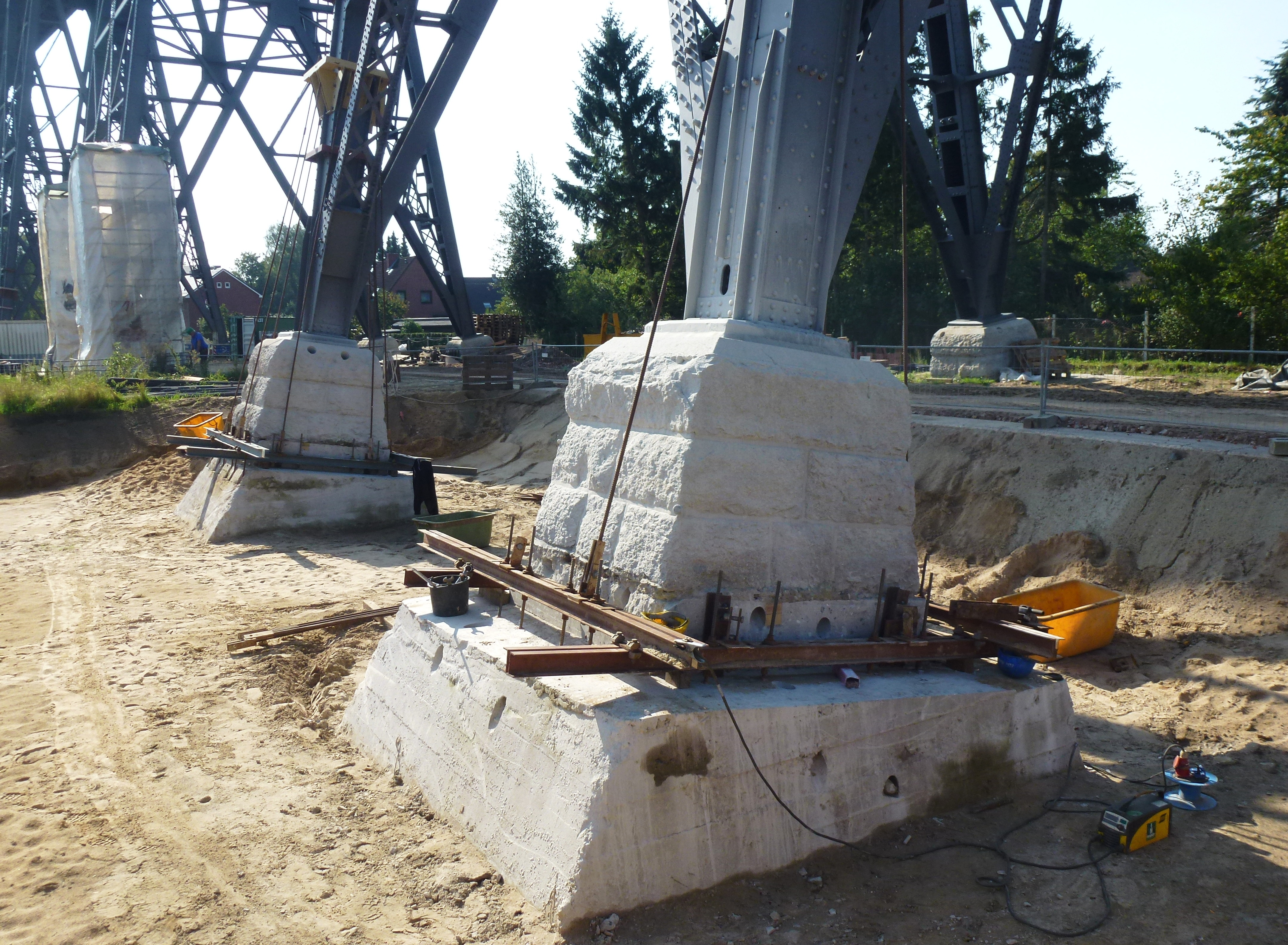 Rendsburger Hochbrücke, Fundamente der Brückenpfeiler